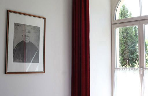 Kloster